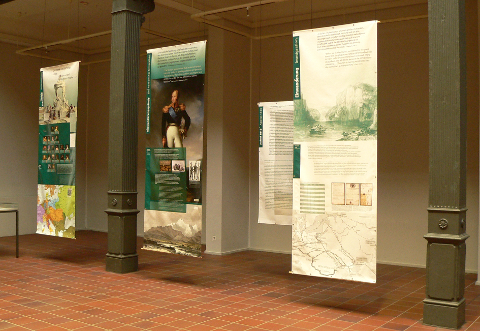 Wanderausstellung Bessarabiendeutsche in Hannover